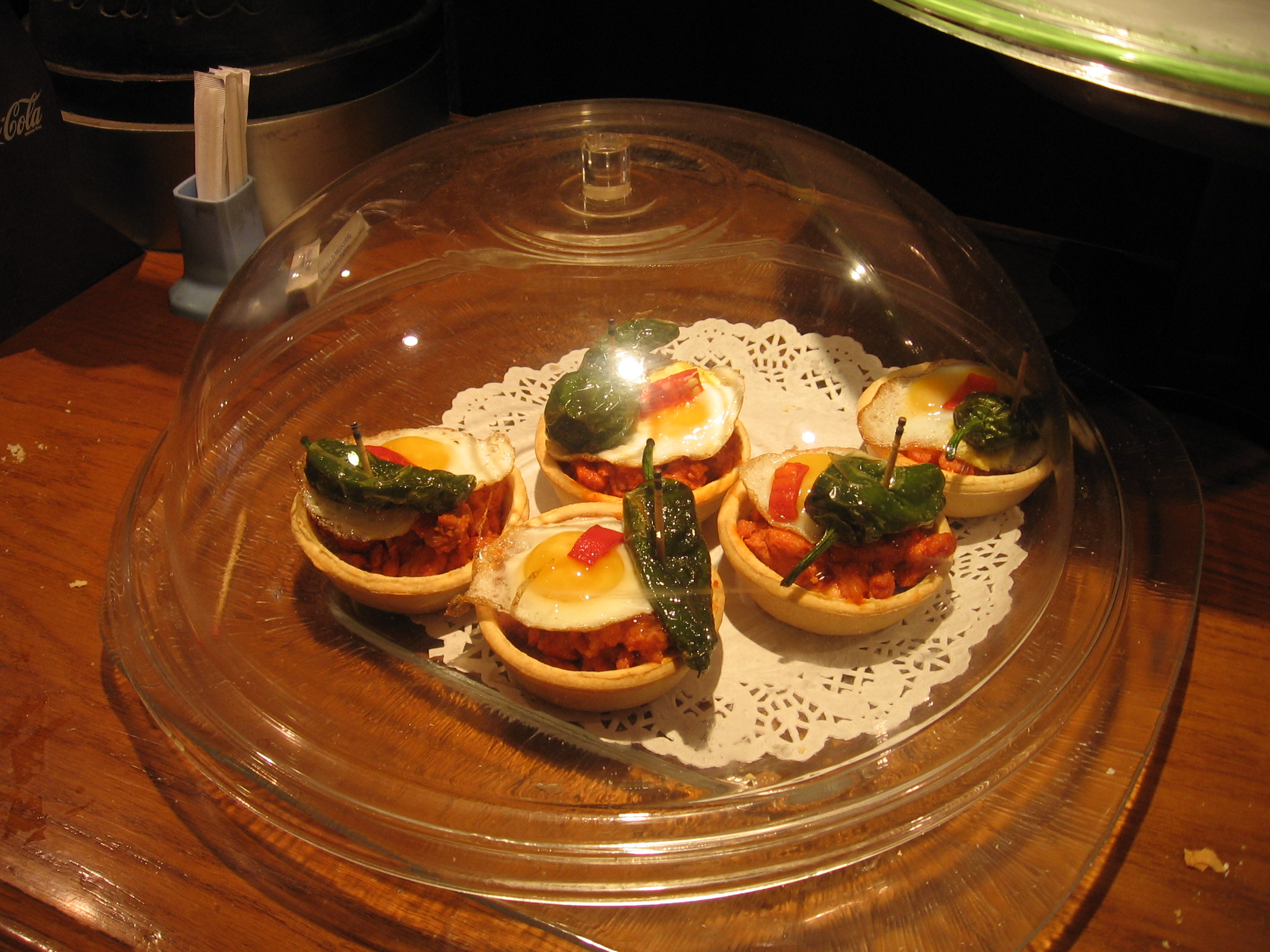 Pinchos en Laguardia, Álava (España)